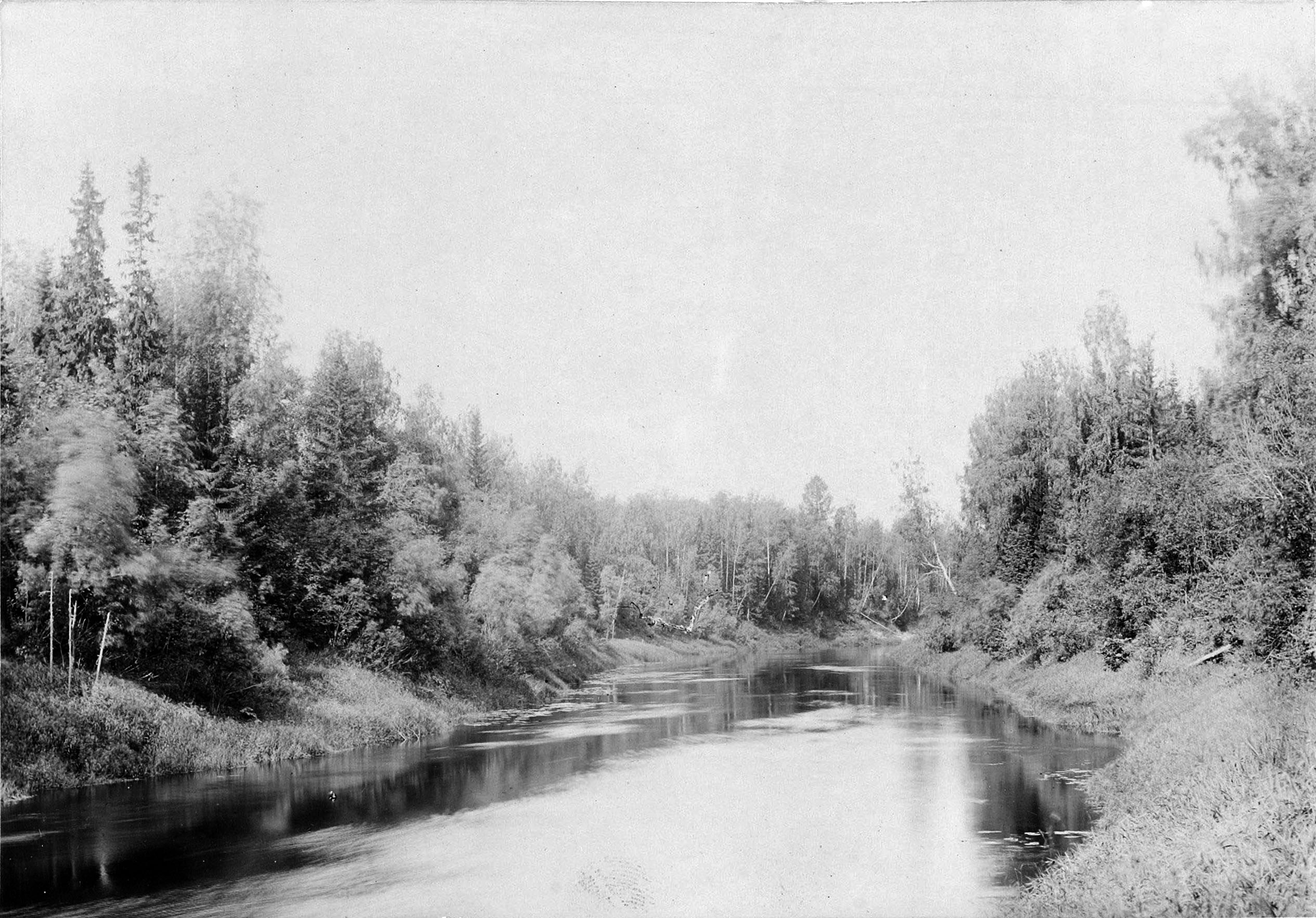 Левый приток реки Вычегды — Северная Кельтма. 1890.